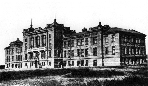 Александровское городское коммерческое училище. Снимок 1911 года